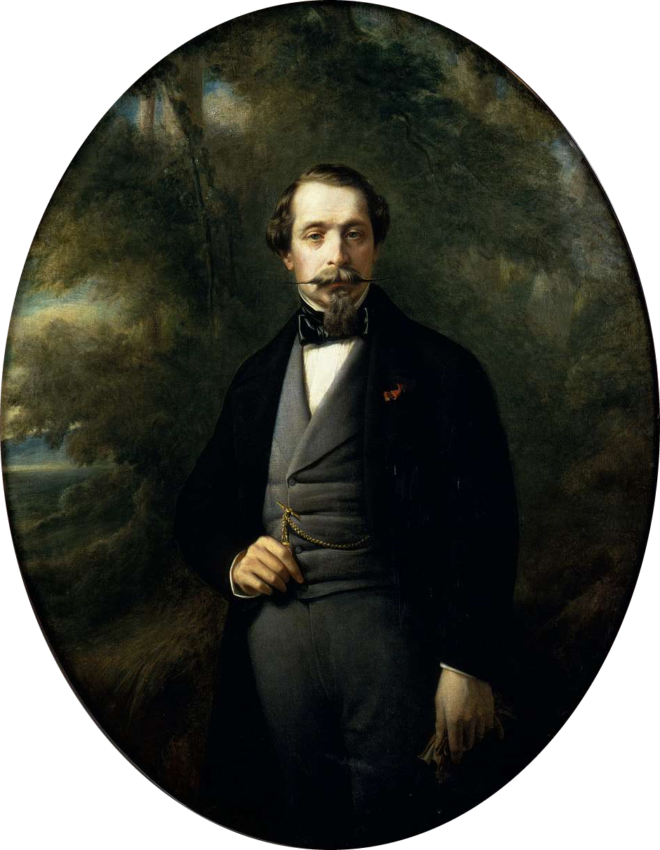 L'empereur Napoléon III, huile sur toile de Franz Xaver Winterhalter, Musée national du château de Compiègne.